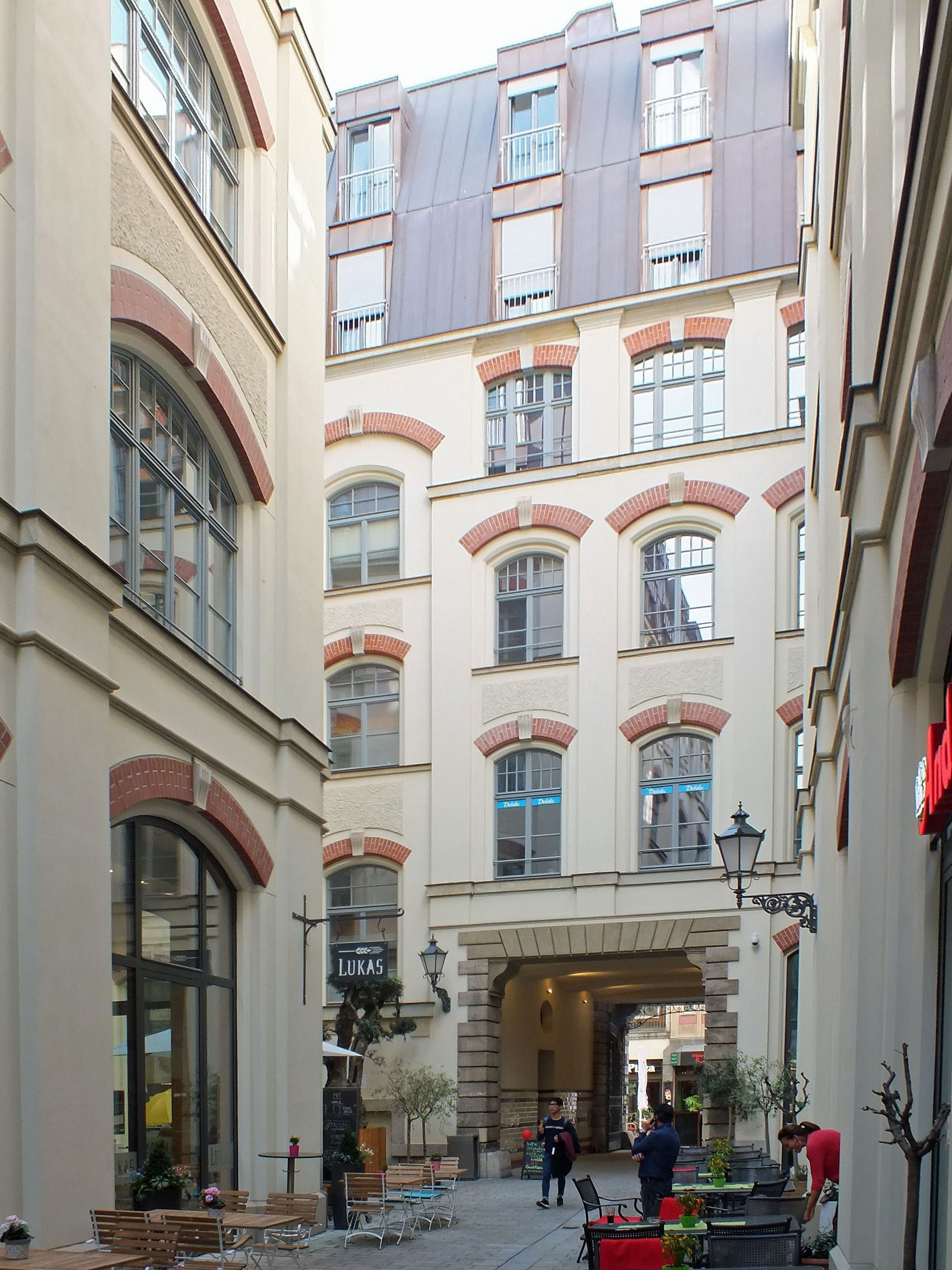 Leipzig: Oelßners Hof nach Westen